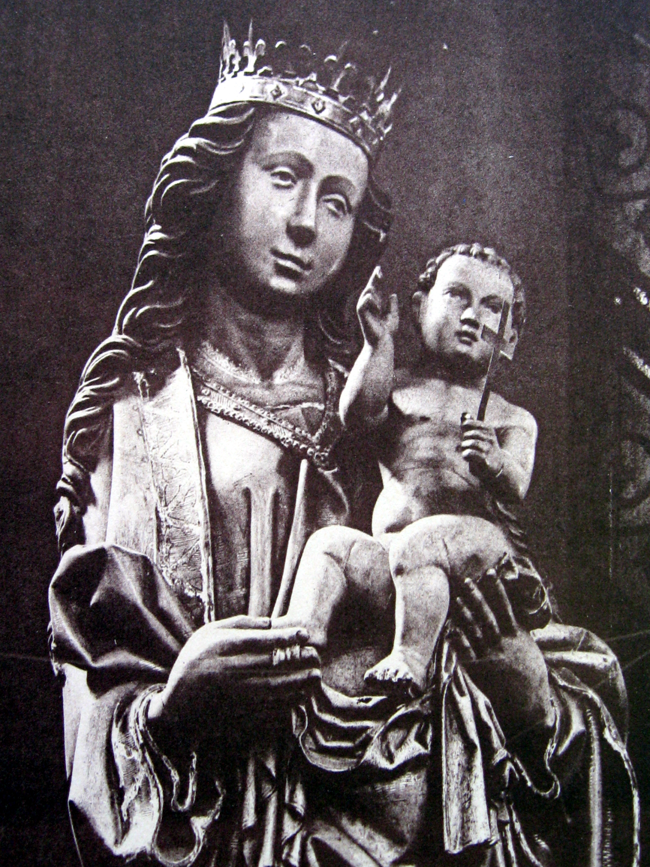 Propsteikirche, Madonna